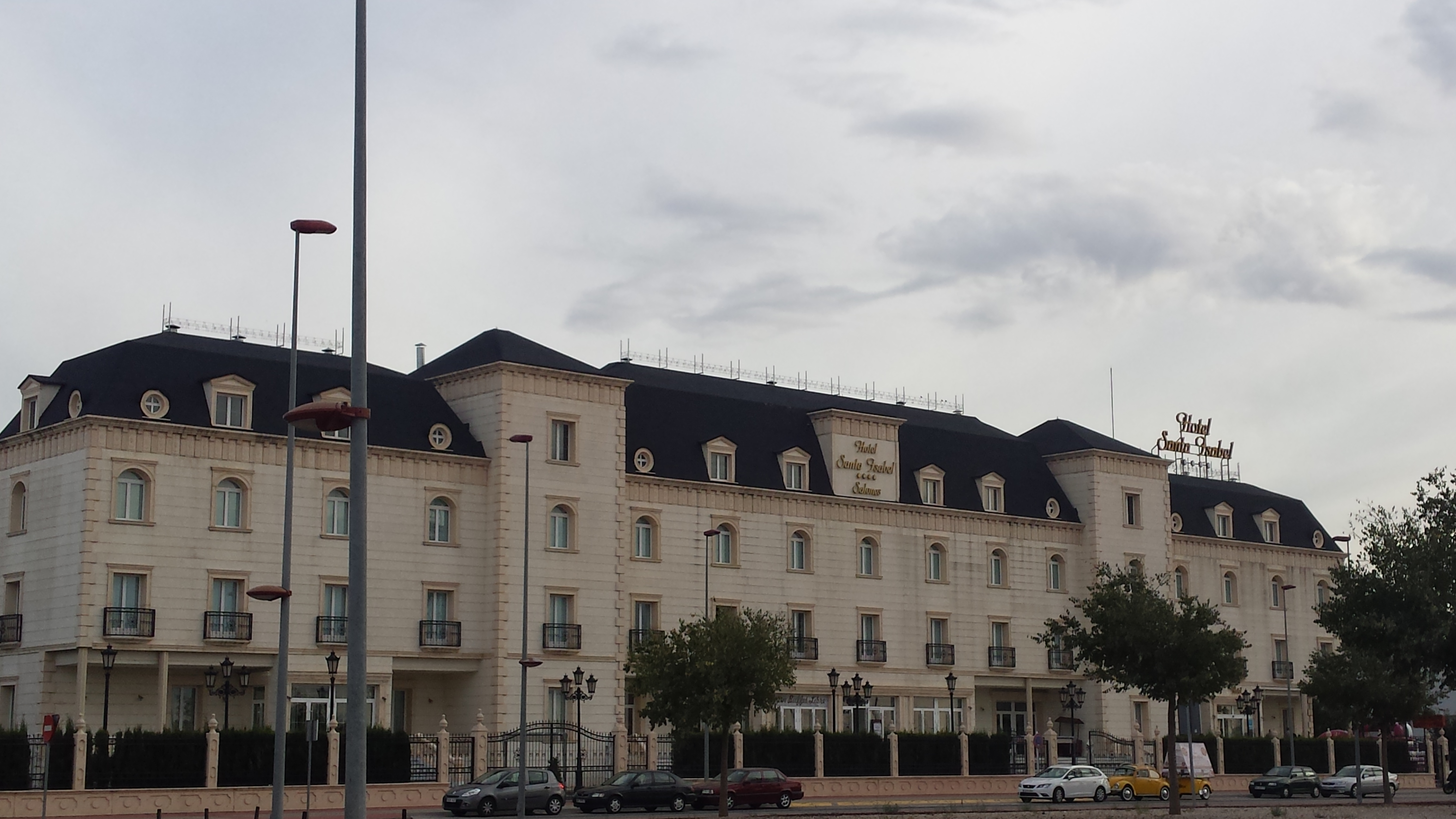 Hotel Santa Isabel (Albacete, Castilla-La Mancha).